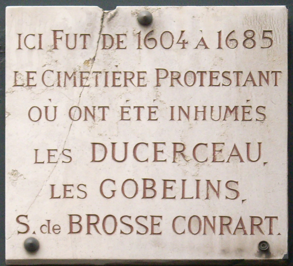 Plaque apposée au n° 30 de la rue des Saints-Pères, Paris 7e. « Ici fut de 1604 à 1685 le Cimetière protestant où ont été inhumés les Ducerceau, les Gobelins, S. de Brosse, Conrart. »